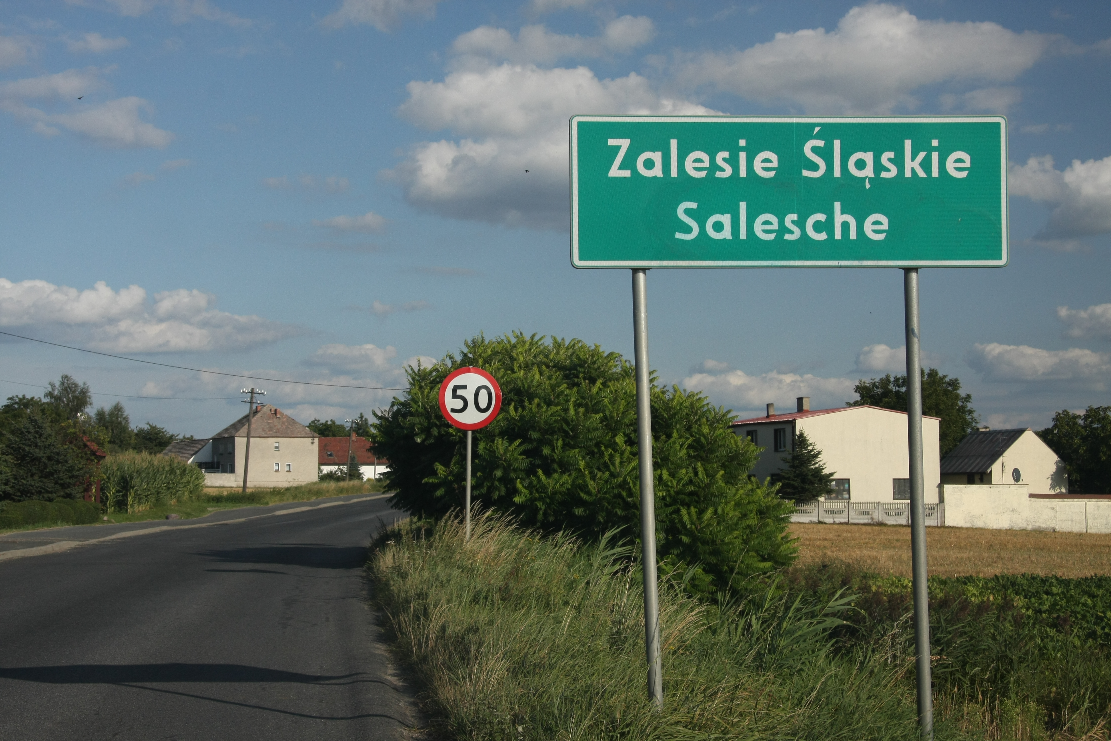 Dwujęzyczna tablica z nazwą przed wjazdem do Zalesia Śląskiego